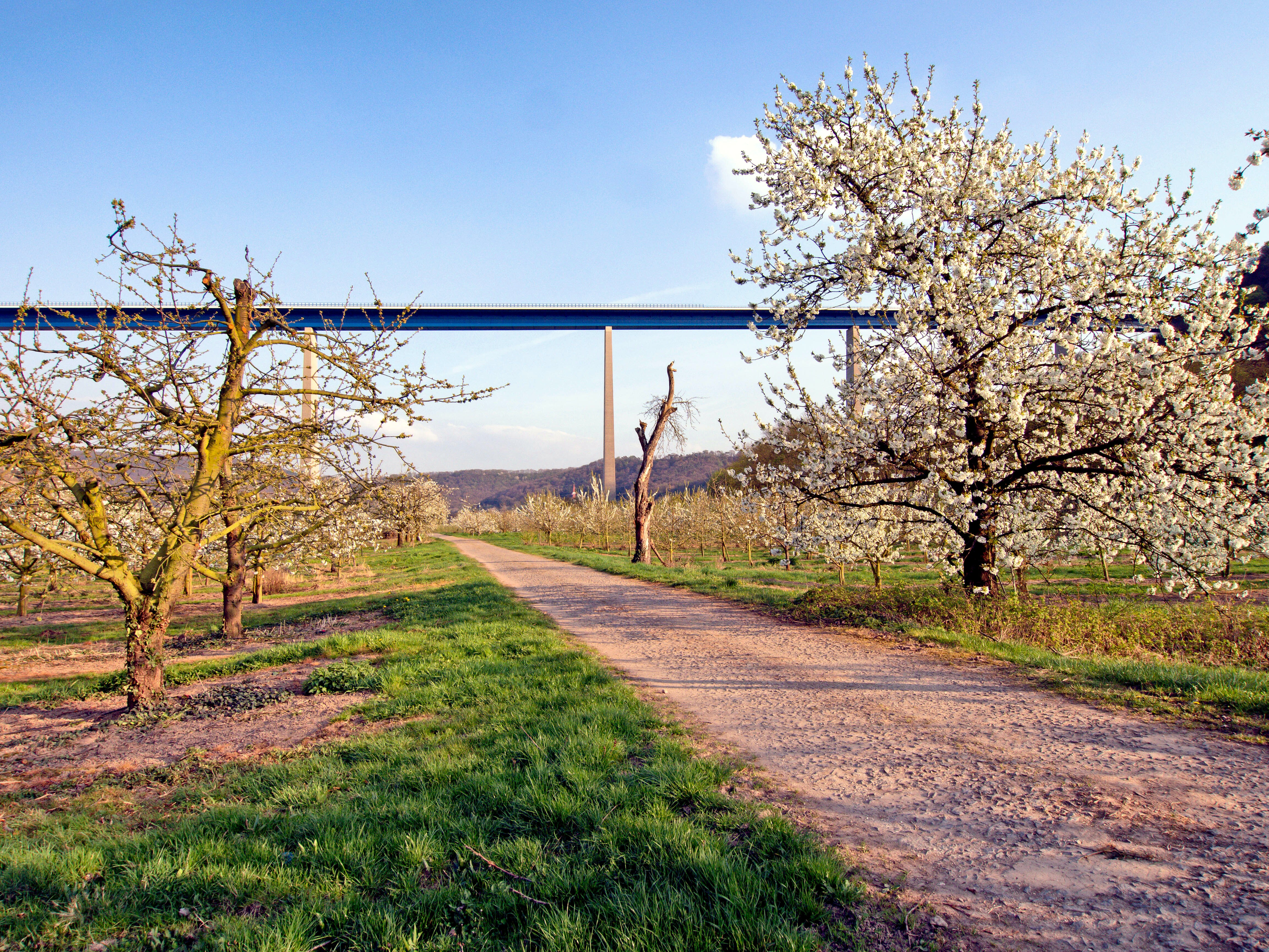 Alte Kirschbäume im Dieblicher Moselbogen unterhalb der Moseltalbrücke (A61) zur Blütezeit